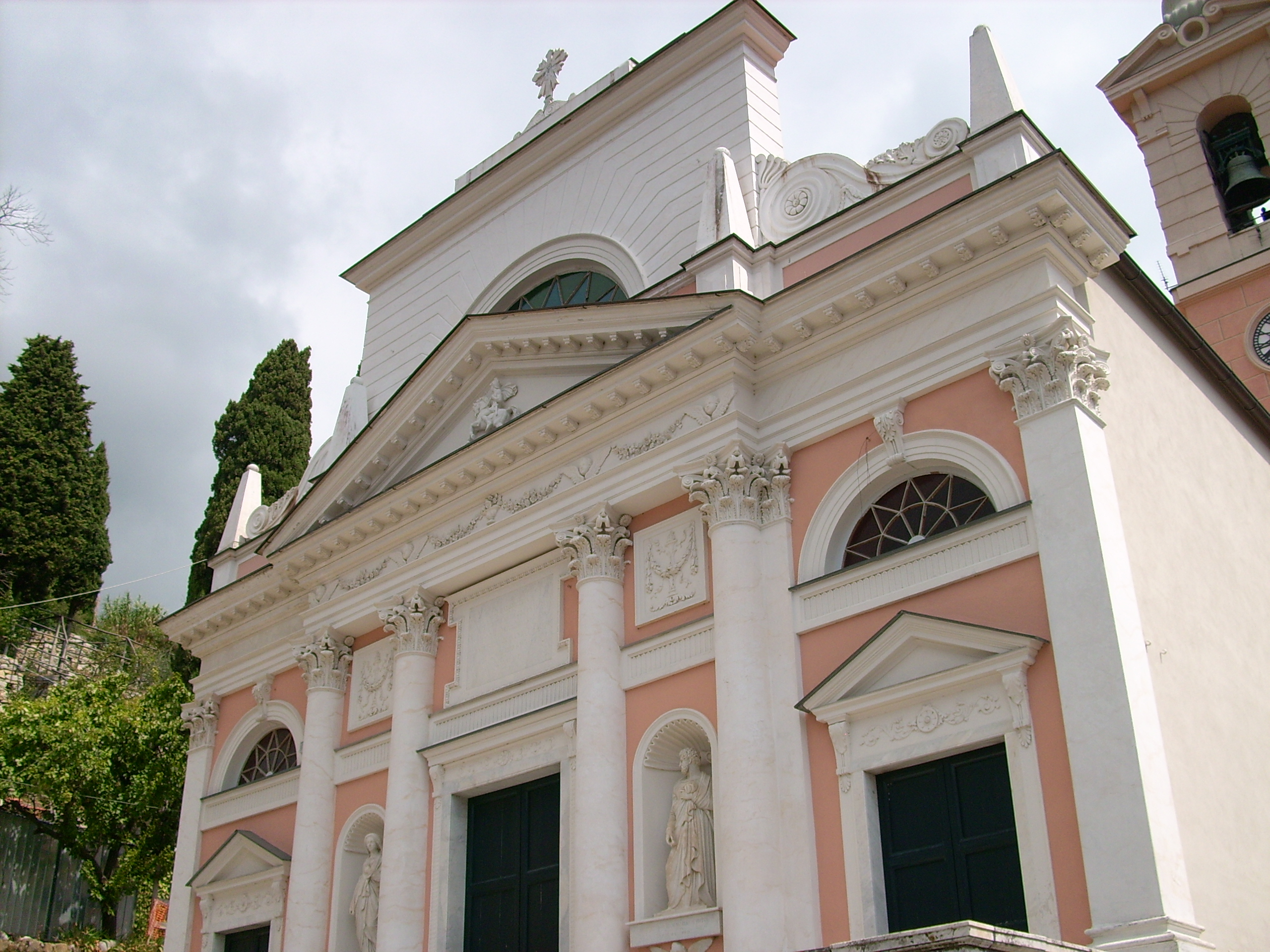 Chiesa di sant'Antonino presso Castiglione Chiavarese, Liguria, Italia